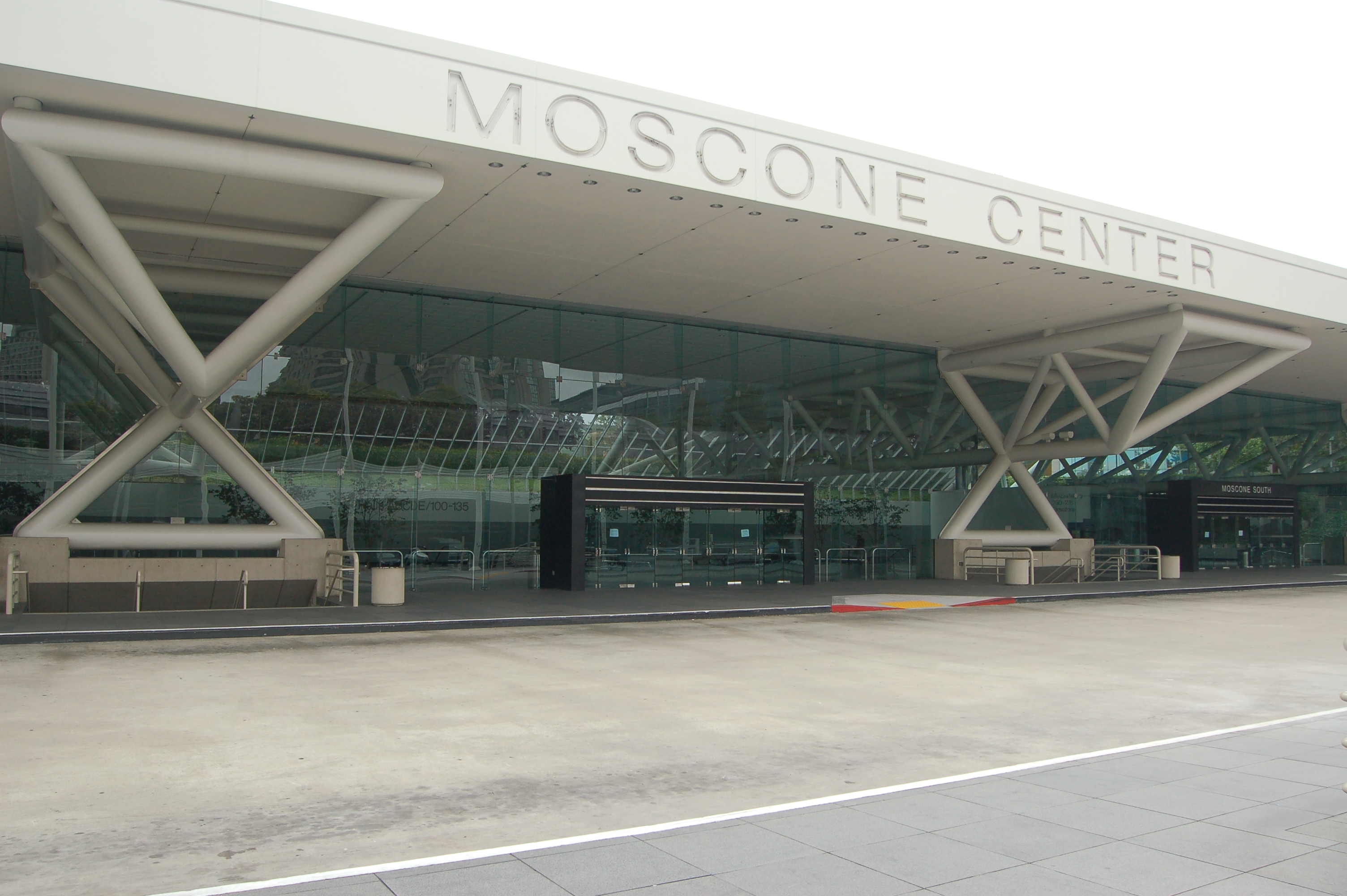 Moscone Center, San Francisco